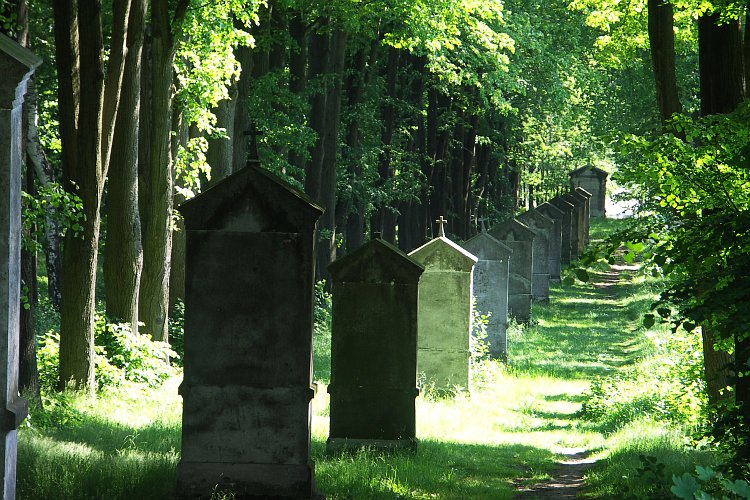 Kalvarie Cvikov, Czech Republic